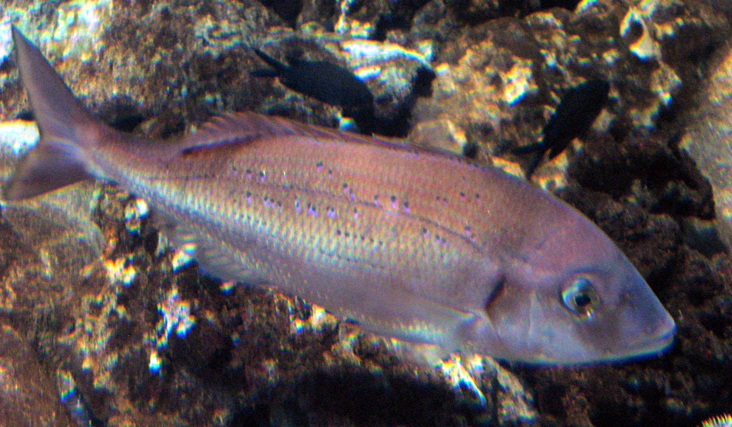 Pagrus pagrus in Aquarium Cinéaqua Map: 48° 51' 44" N 2° 17' 27" E